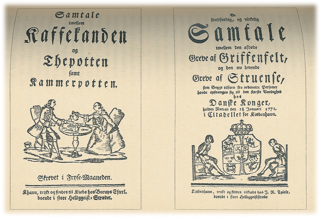 To skrifter udgivet i trykkefrihedsperioden. Hhv før og efter Struensees fald.